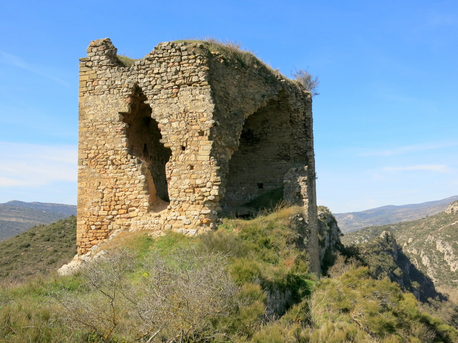 Castell de Rubió de Sols, Foradada, comarca de la Noguera - Catalunya